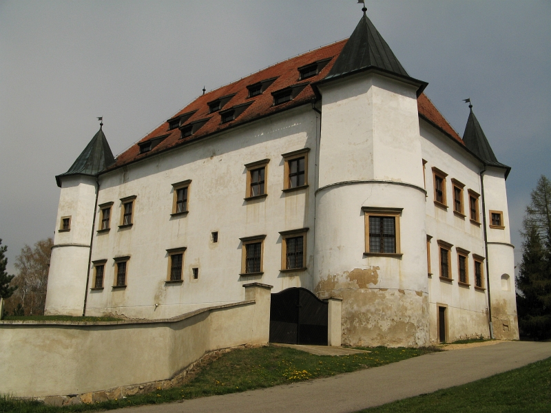 Tvrz (Boskovštejn), náves 32, Boskovštejn